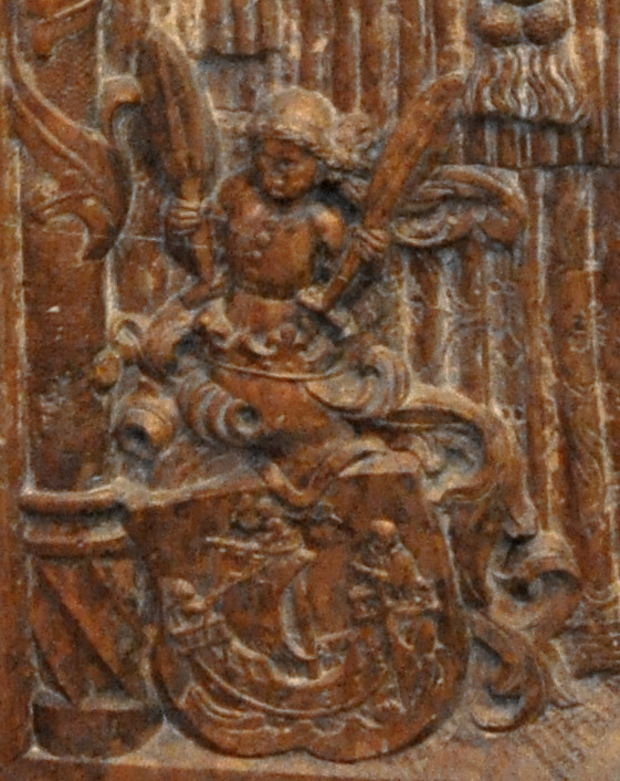 Stuttgart, Stiftskirche, Wappen vom Epitaph des Kanzlers und Stiftspropsts Ludwig Vergenhans († 1512), Bruder des Johannes Nauclerus (eigtl. Vergenhans); ; im Chor der Stiftskirche